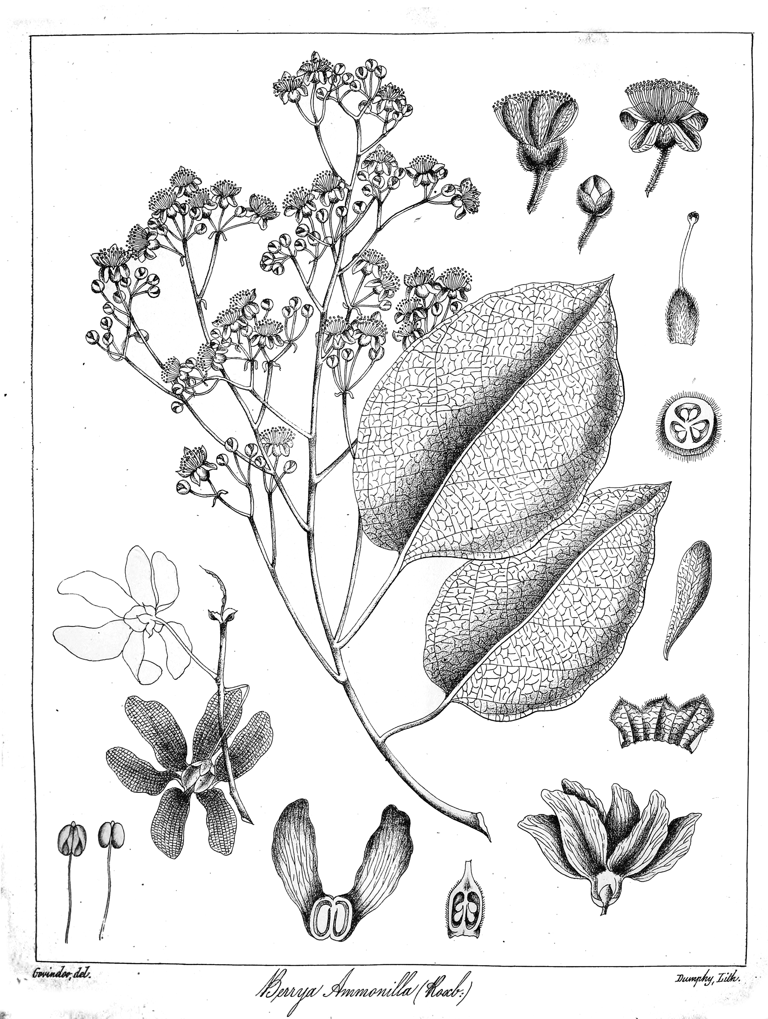 Berrya cordifolia